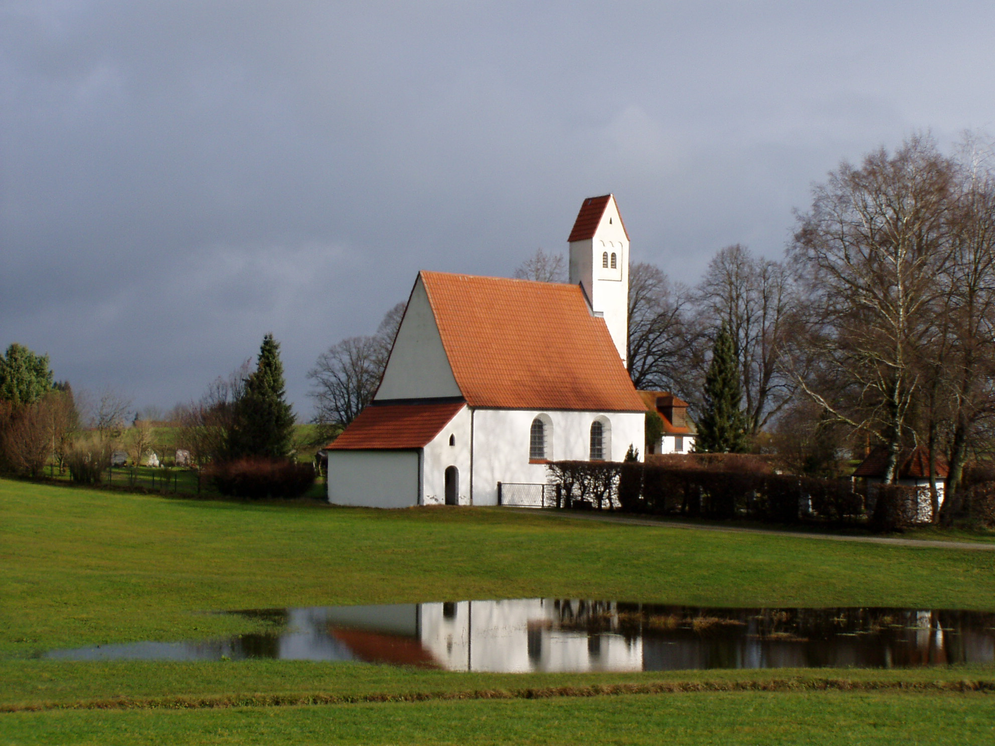 Kapelle St. Walburga bei Ruderatshofen, Ostallgäu